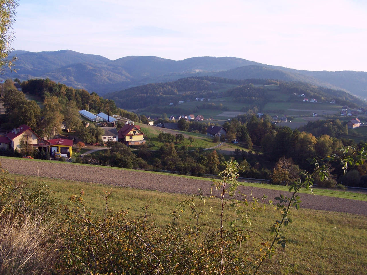 Pasmo Łososińskie. Widok z Paproci